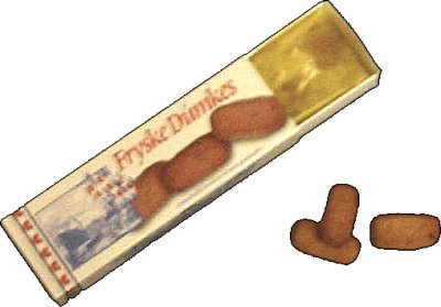 Dumkes, eigen foto Categorie:Afbeelding voedsel